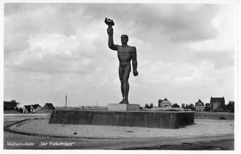 Sechs Meter hohe Skulptur eines bronzenen Fackelträgers. Das Ehrenmal von Carl Moritz Schreiner auf der Witthaushöhe in Mülheim an der Ruhr (am heutigen Standort des Ruhr-Reeder-Hauses) wurde 1928 aufgestellt und 1933 entfernt. Im Volksmund wurde die Statue "Der nackte Heinrich" genannt.